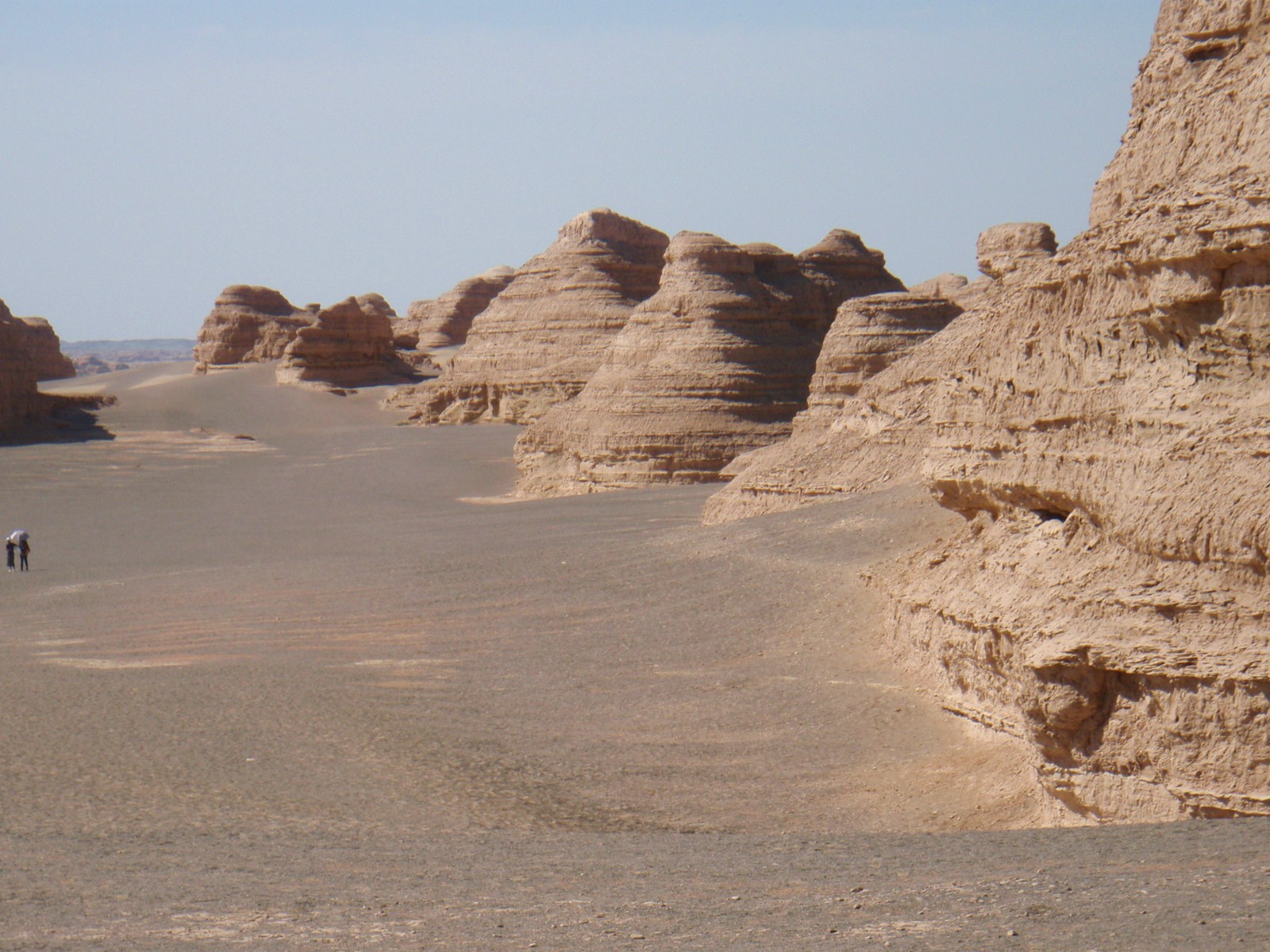 Gobi Desert- Yadan National Park